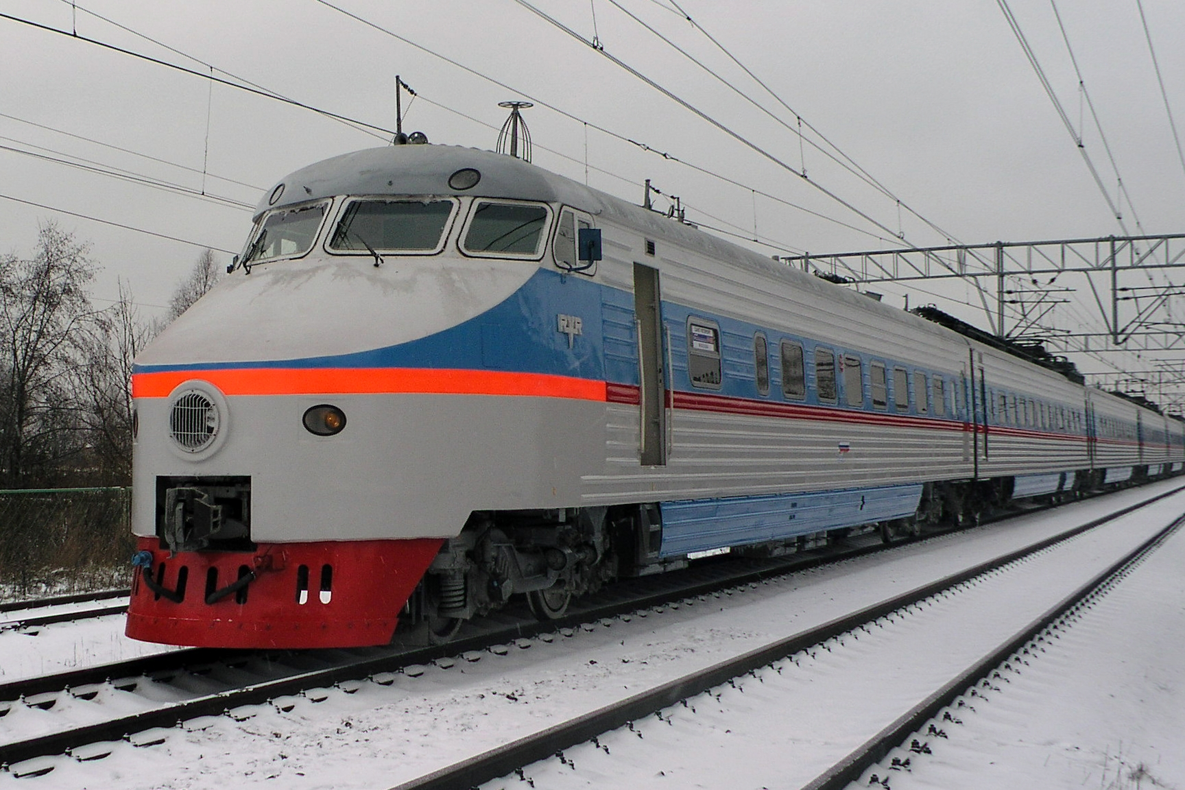 ЭР-200 на главном ходу Санкт-Петербург-Москва